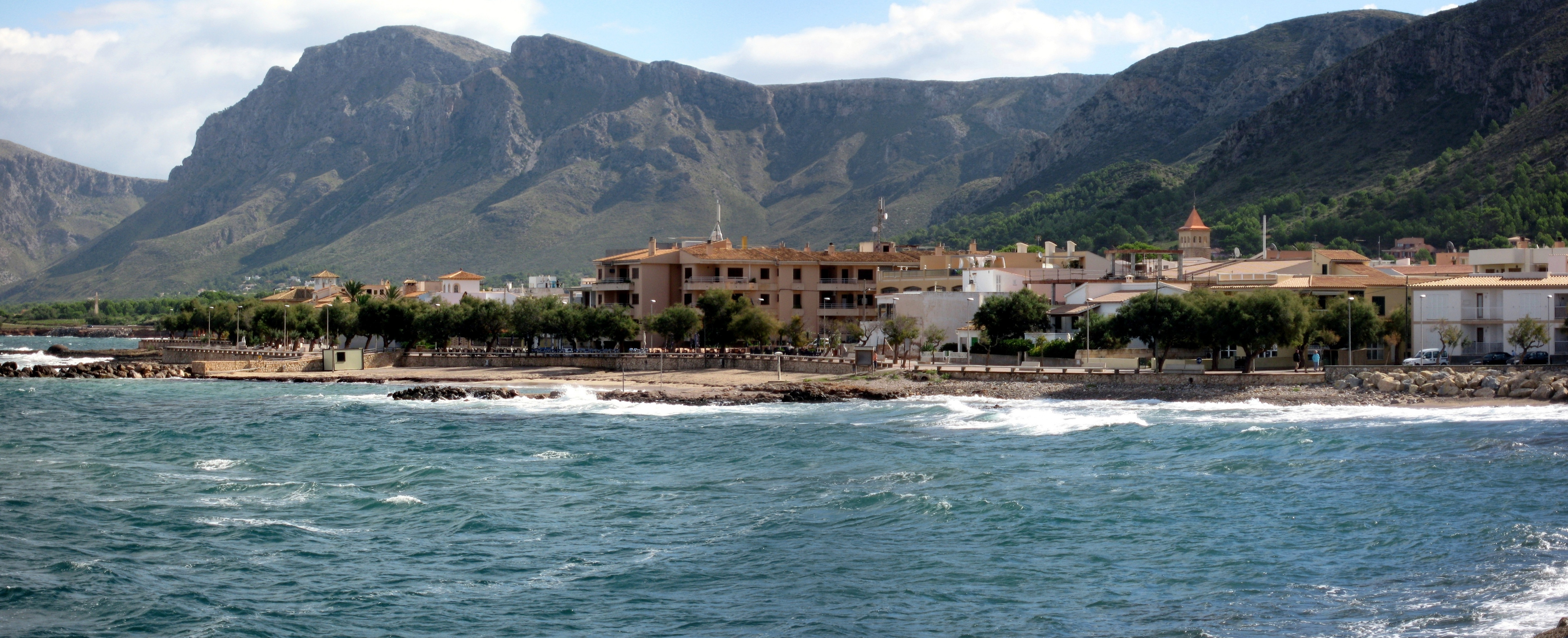 Colònia de Sant Pere, Artà, Mallorca, Spain